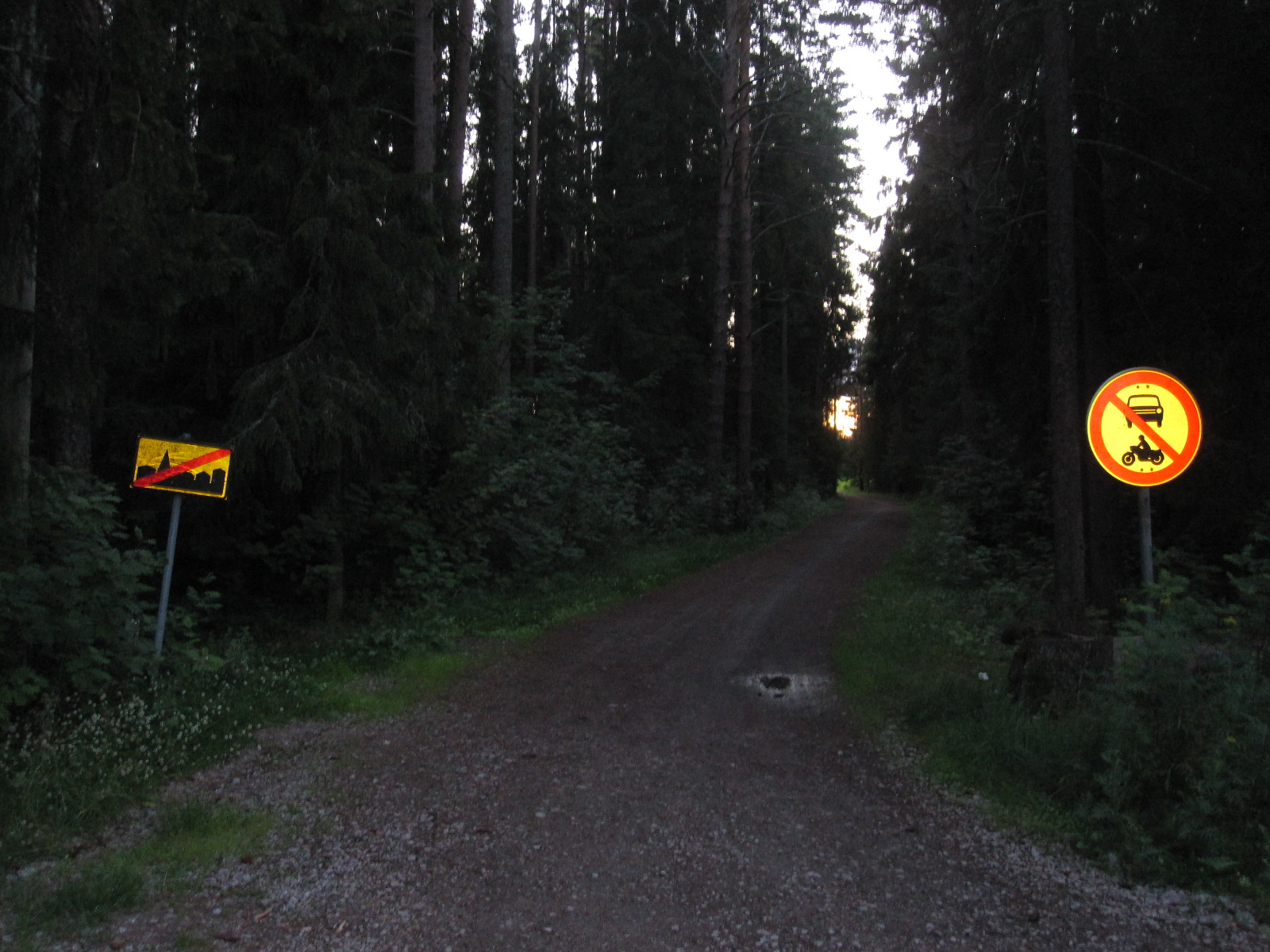 Näkymä Kiiesmetsään, Kempeleen Ollilassa. Metsän halki menevä (nykyään moottoriajoneuvoilta kielletty tie) johtaa Piriläntielle